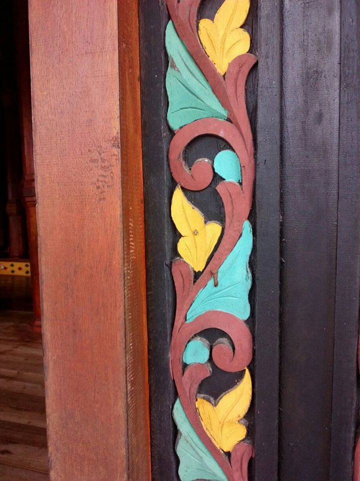 Ukiran Minang aka sagagang